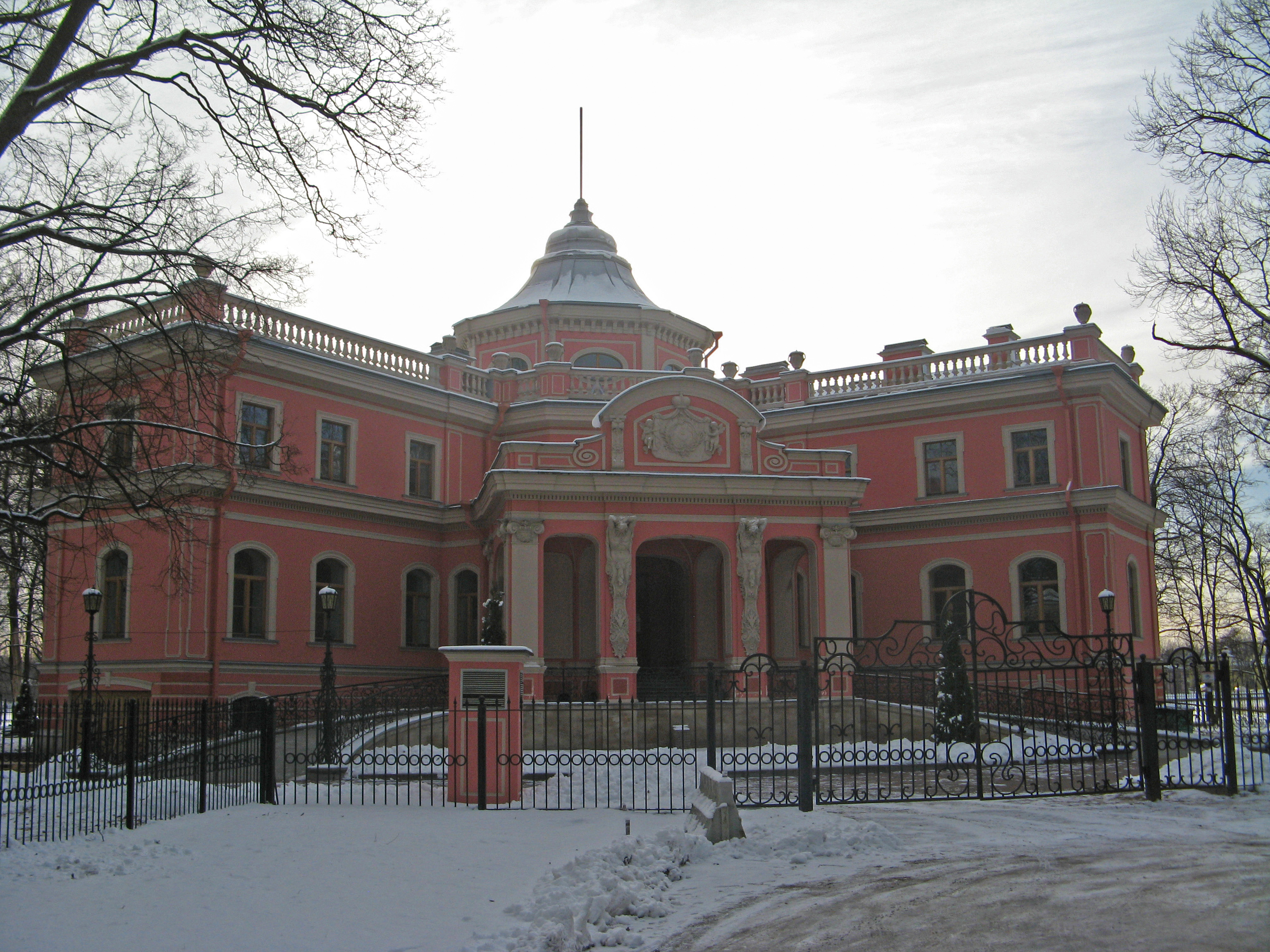 Усадьба князей Белосельских-Белозерских: Крестовский проспект, 20, 22, Петроградский район, Санкт-Петербург